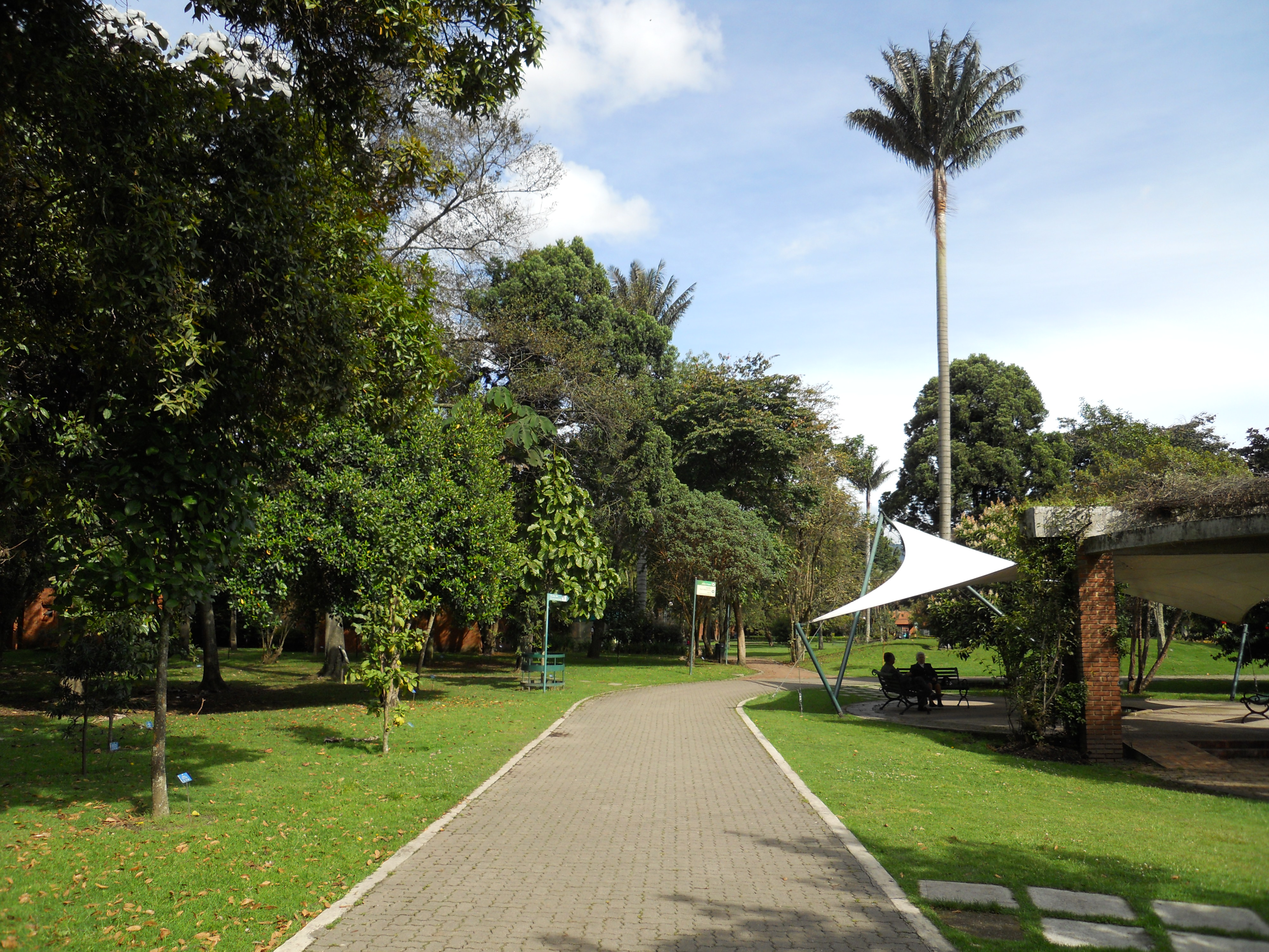 Sendero en el Jardín botánico de Bogotá.